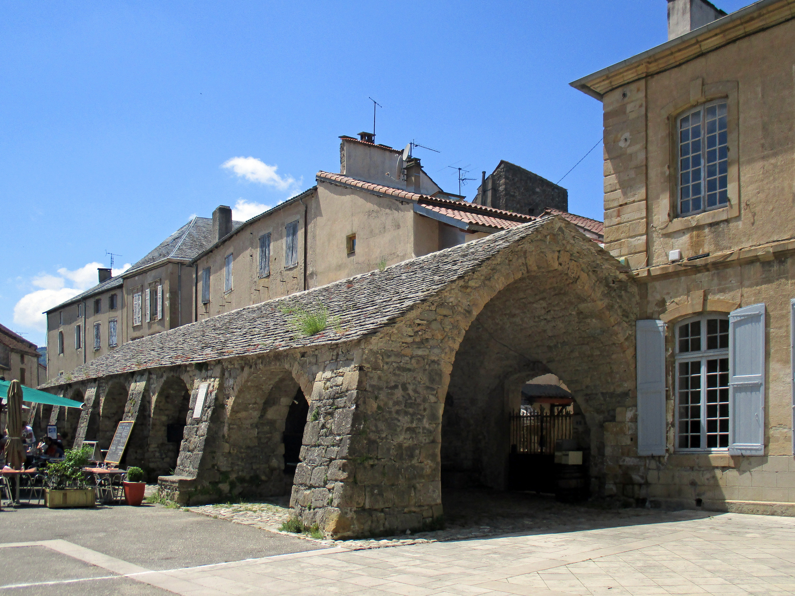 Halles de Nant .